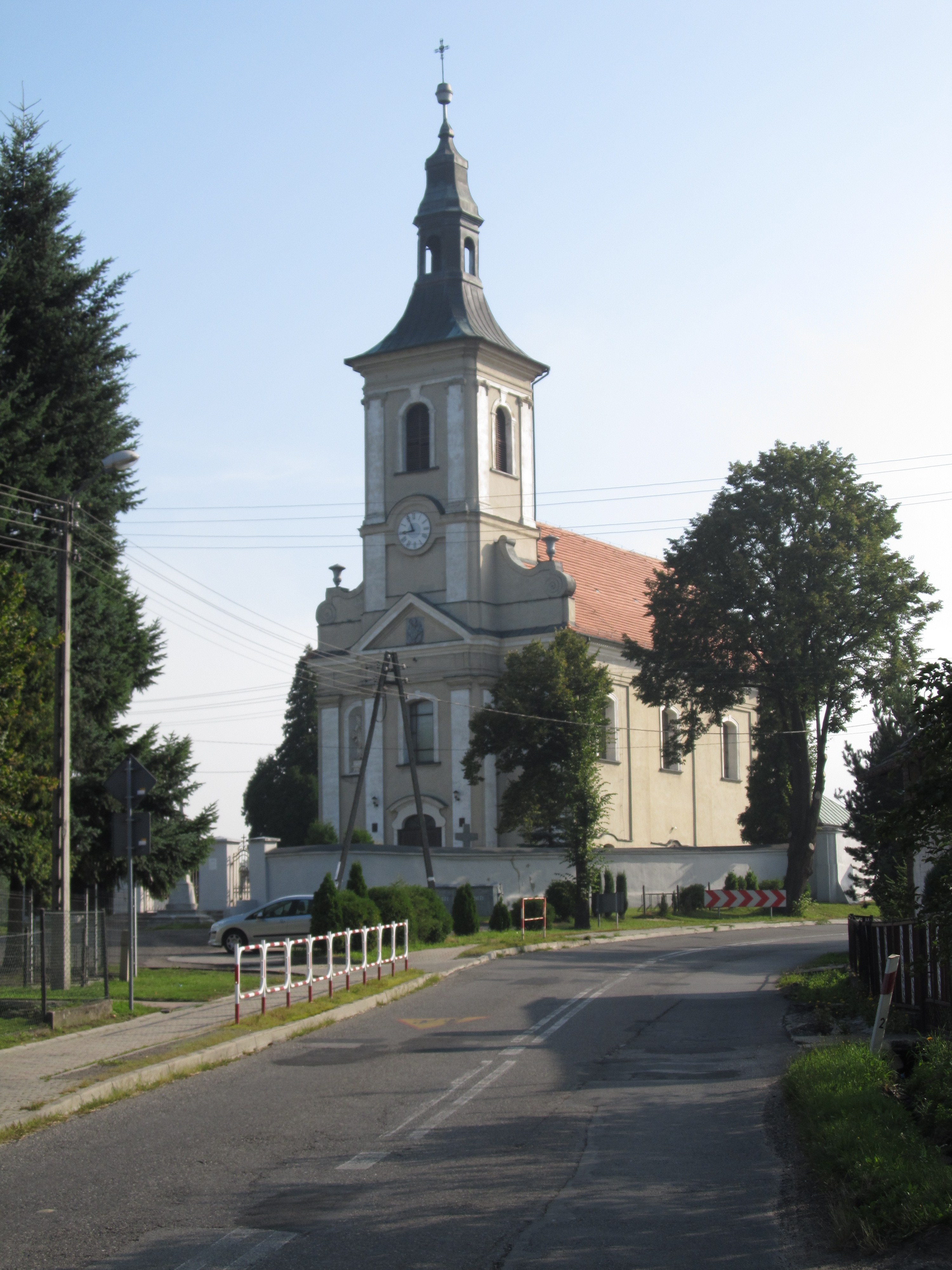 Stanica, ul. Gliwicka 16 - rzymskokatolicki kościół parafialny pw. św. Marcina, 1800-1804